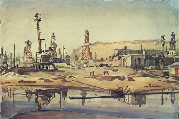 К.В. Богаевский. Бакинские нефтяные промыслы. 1930